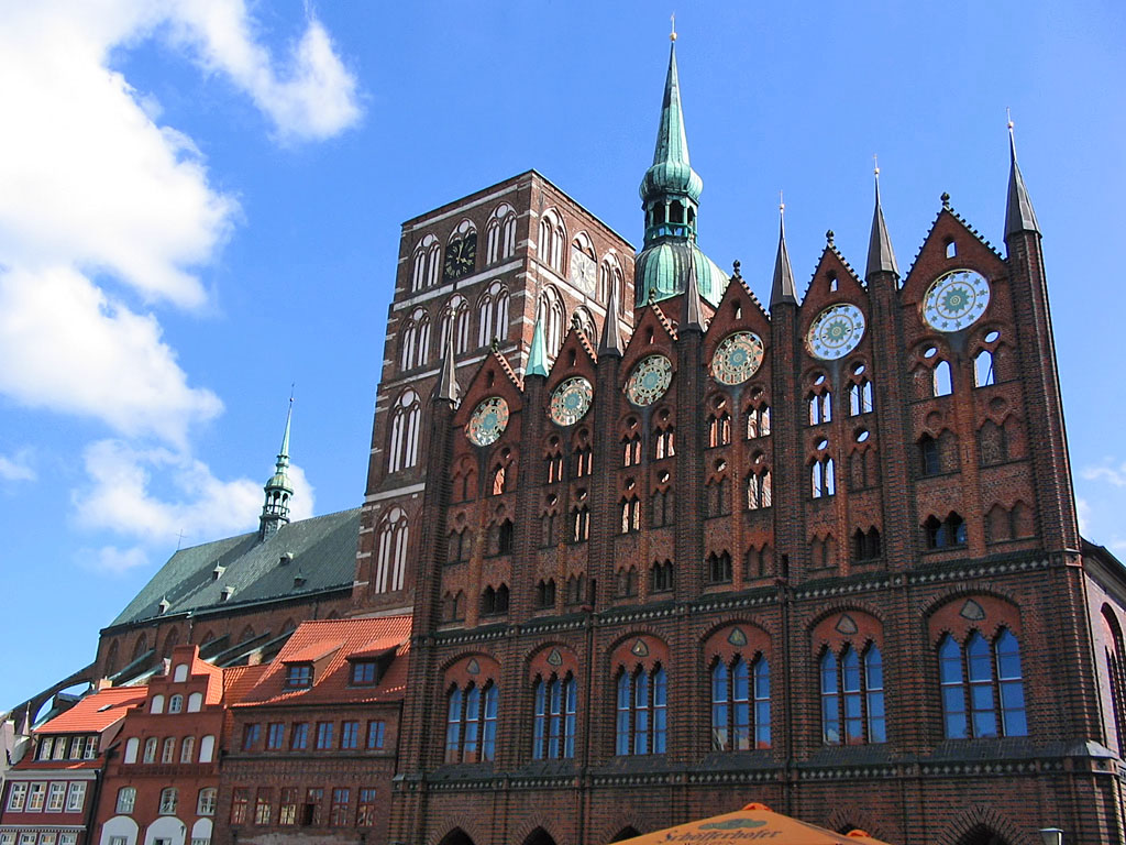 Rathaus, Stralsund